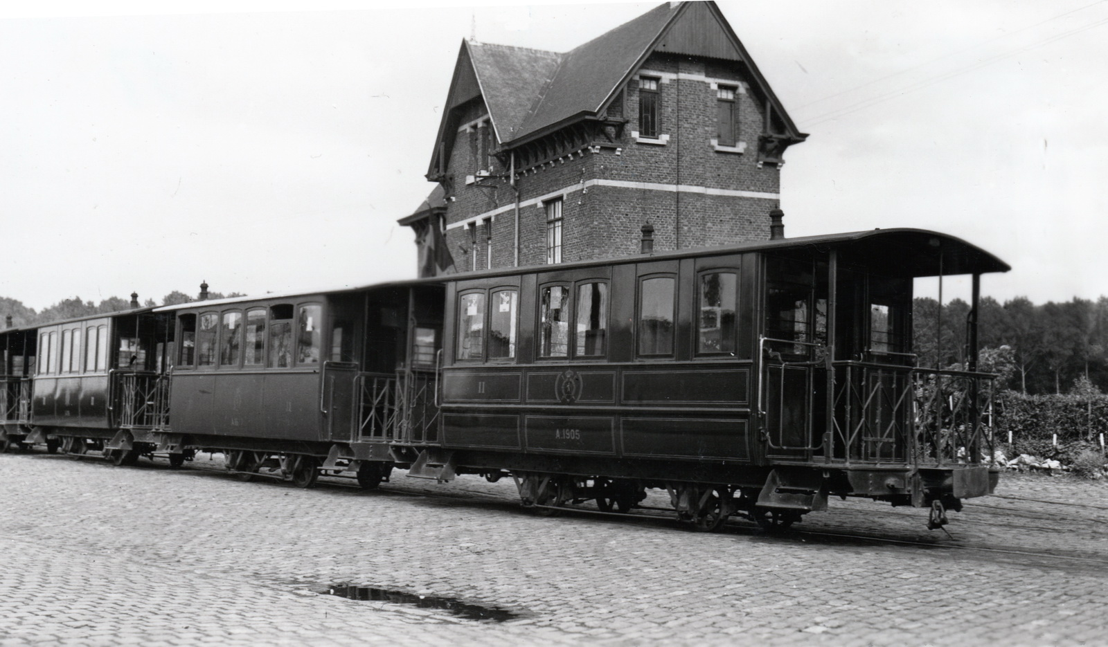 Remorques vapeur devant la gare vicinale de Melreux.